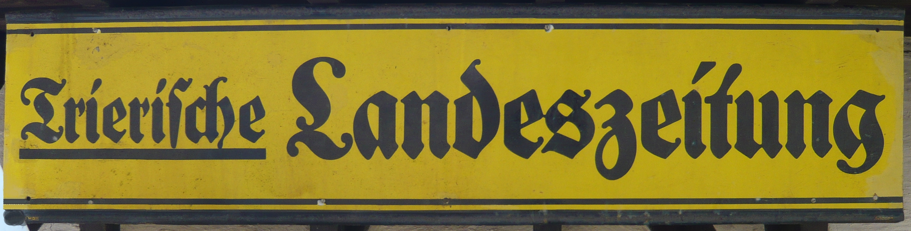 Trierische Landeszeitung, ehemaliges Verkaufsstellenschild. Aufgenommen im Volkskunde- und Freilichtmuseum Roscheider Hof, Konz.